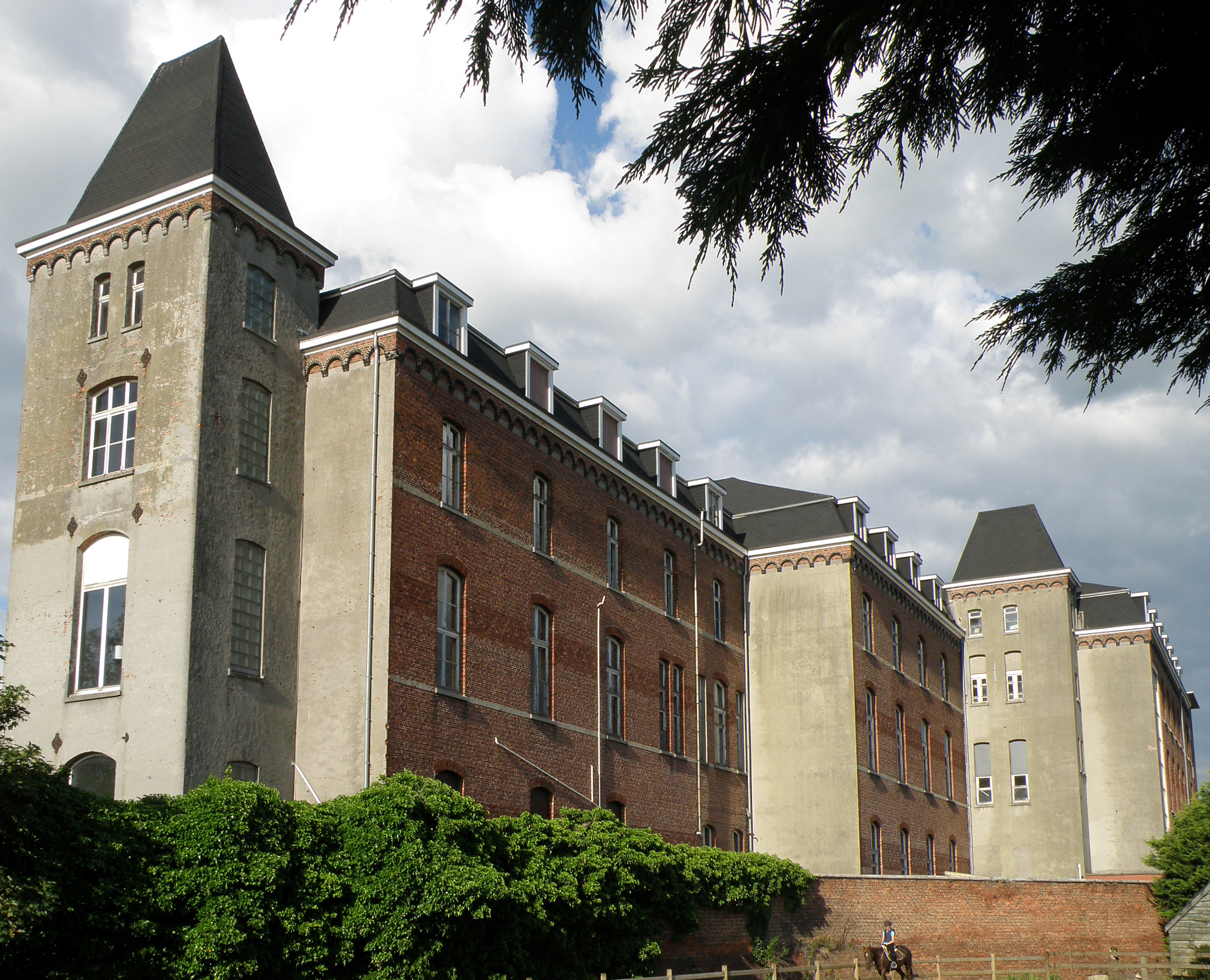 Borsbeek (prov. Antwerpen, België). Sint-Jozefinstituut (middelbare school), in de dorpskern.